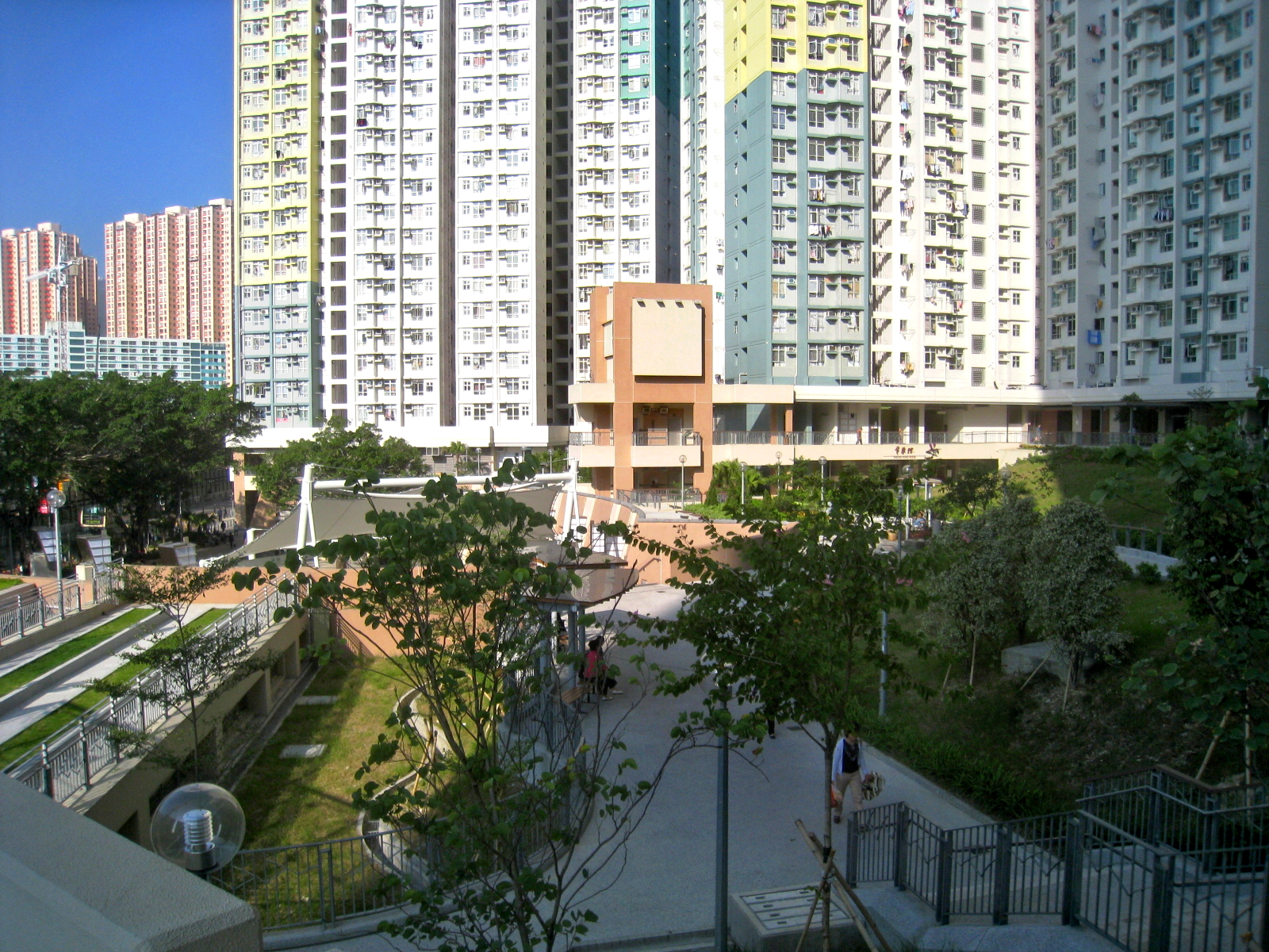 Upper Ngau Tau Kok Estate 牛頭角上邨